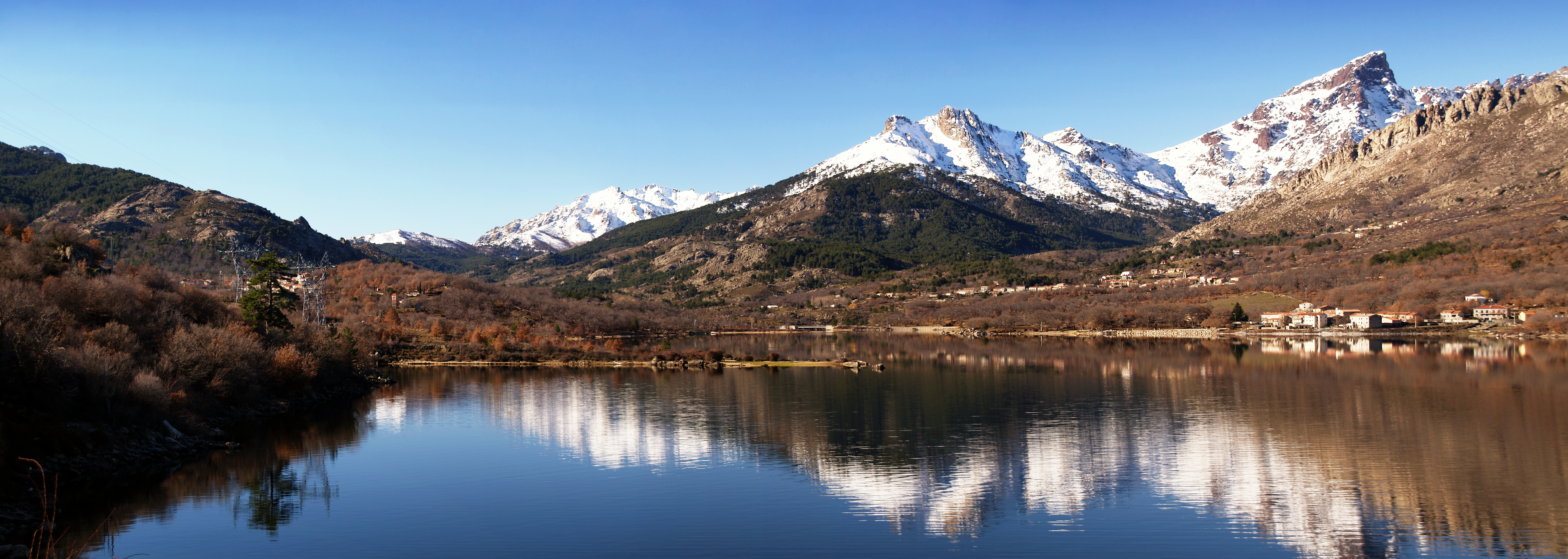 Albertacce (Corsica) - Panorama d'Albertacce